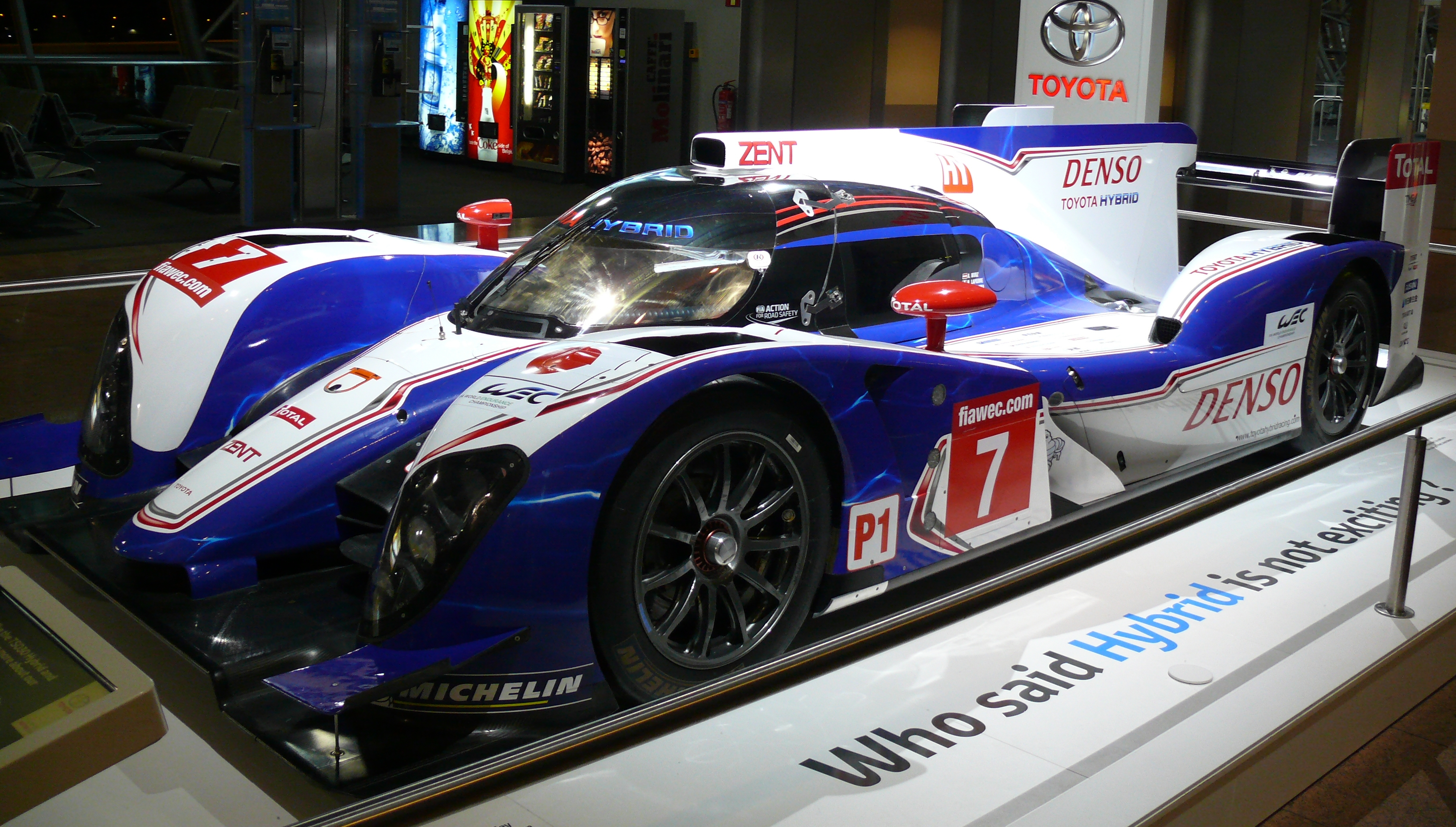 Toyota TS030 Hybrid le Mans prototype at Zaventem Brussels Airport.